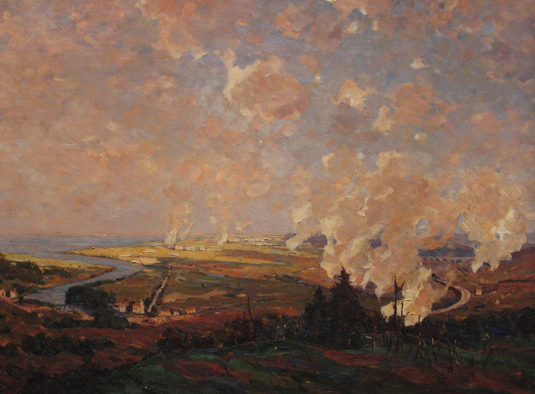 Das Vorfeld der Hermada während der 11. Isonzo-Schlacht (August 1917).